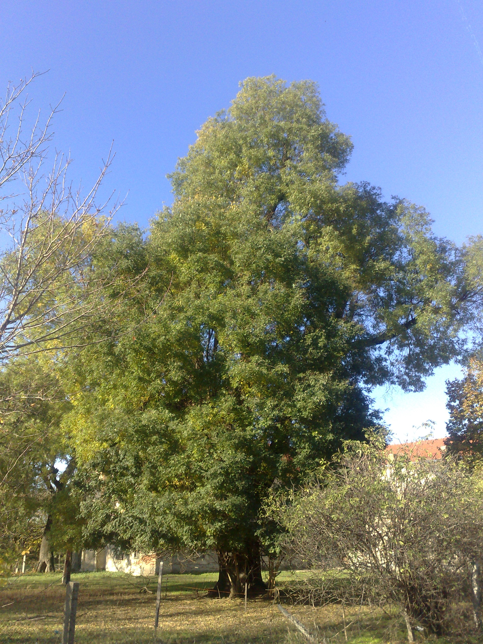 Közönséges pagodafa (japánakác) az egyedi kastély udvarán.